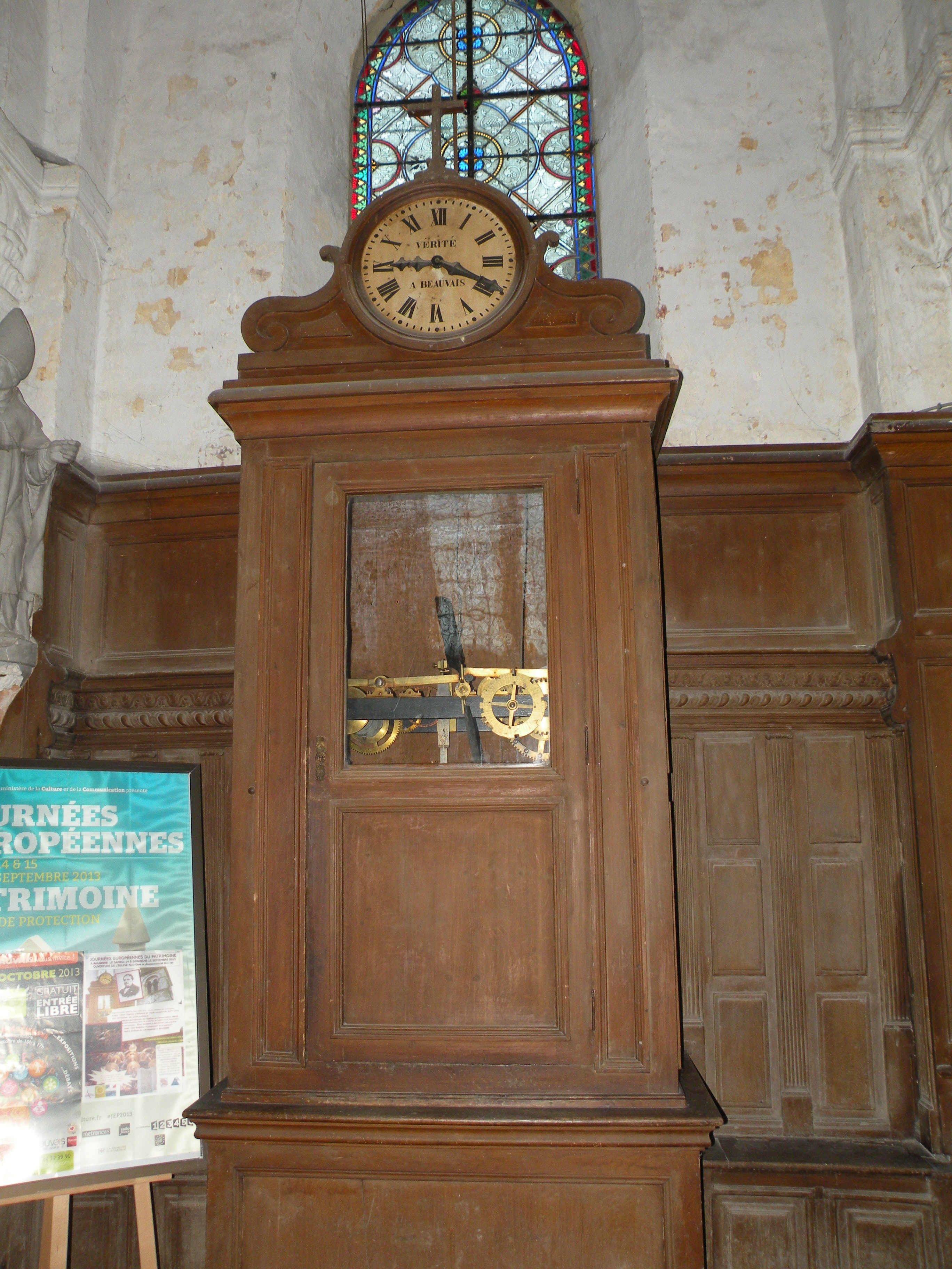 Église Notre-Dame de l'Annonciation d'Allonne - horloge avec son meuble (cabinet) et son système de tringlerie, 1840.